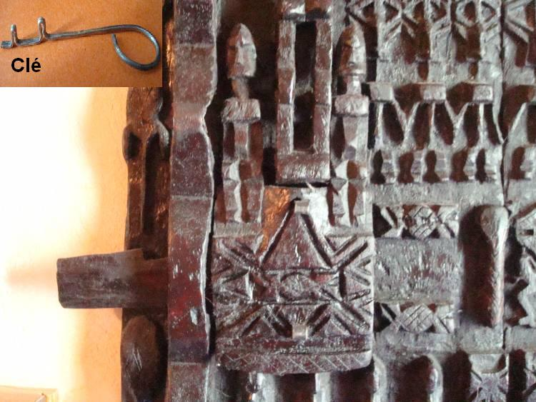 Serrure de porte de grenier à grain du pays Dogon au Mali.